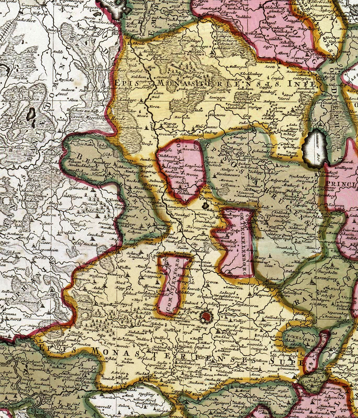 Ausschnitt aus: "Tabula Nova Atque Exacta Westphaliae Finitimas quoque Ditiones Prafecturas et Satrapias Eleganter Comprehendens" (=Eine neue und genaue Karte von Westfalen, welche auch die benachbarten Herrschaftsgebiete, Grafschaften und Fürstentümer korrekt enthält